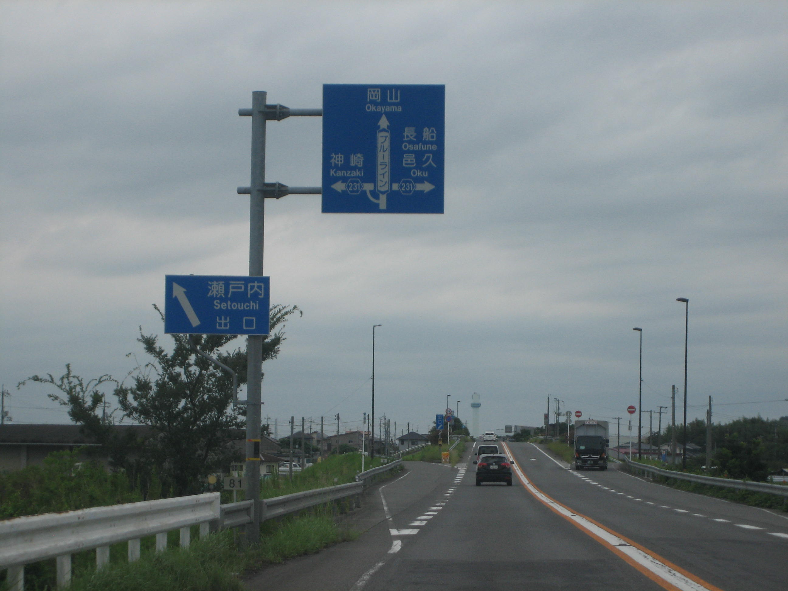 瀬戸内IC出口